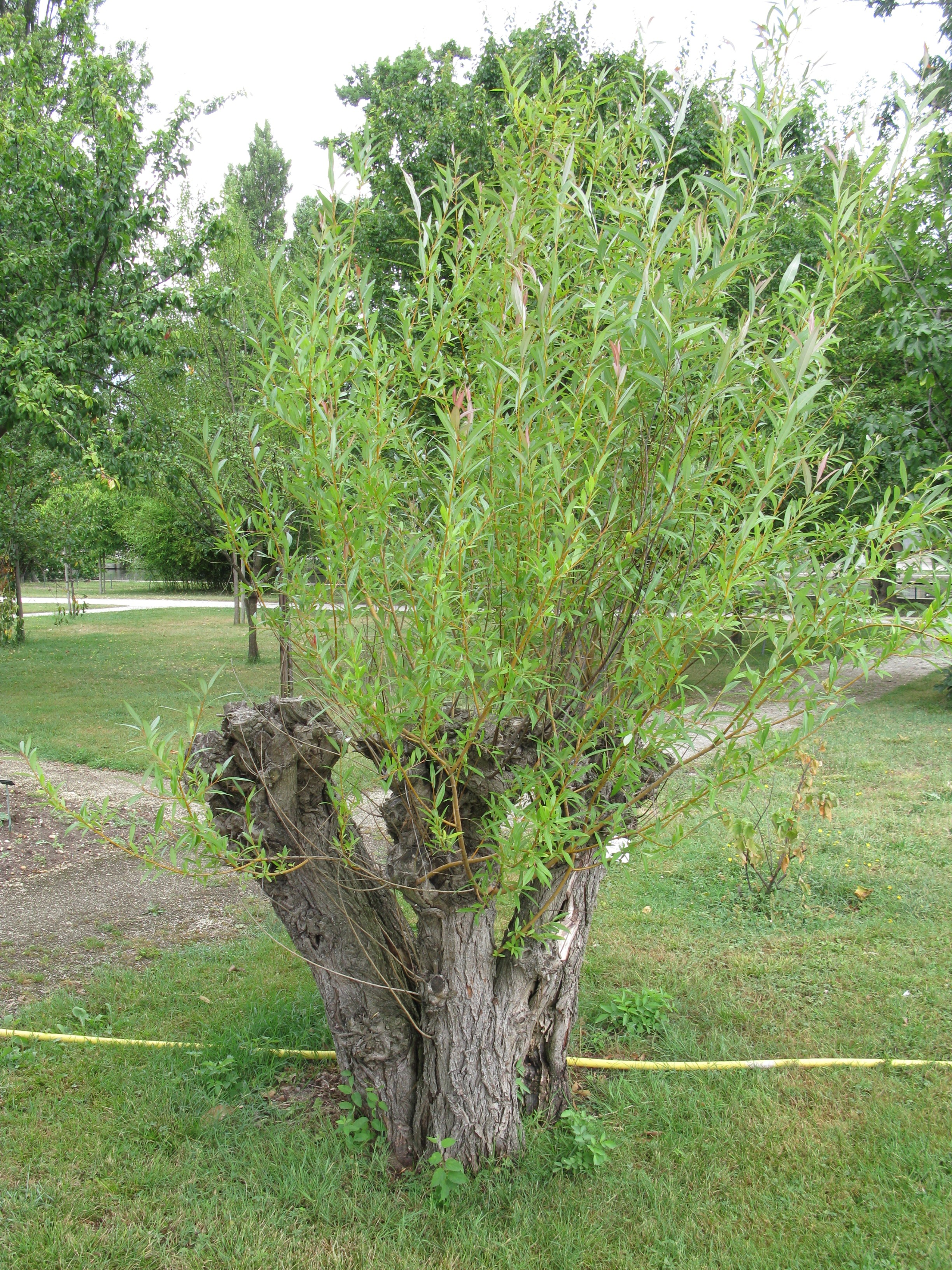 Salix viminalis dans le parc Peixotto à Talence.